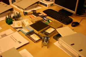 . Mira la fundación FIDAS en nuestra web.